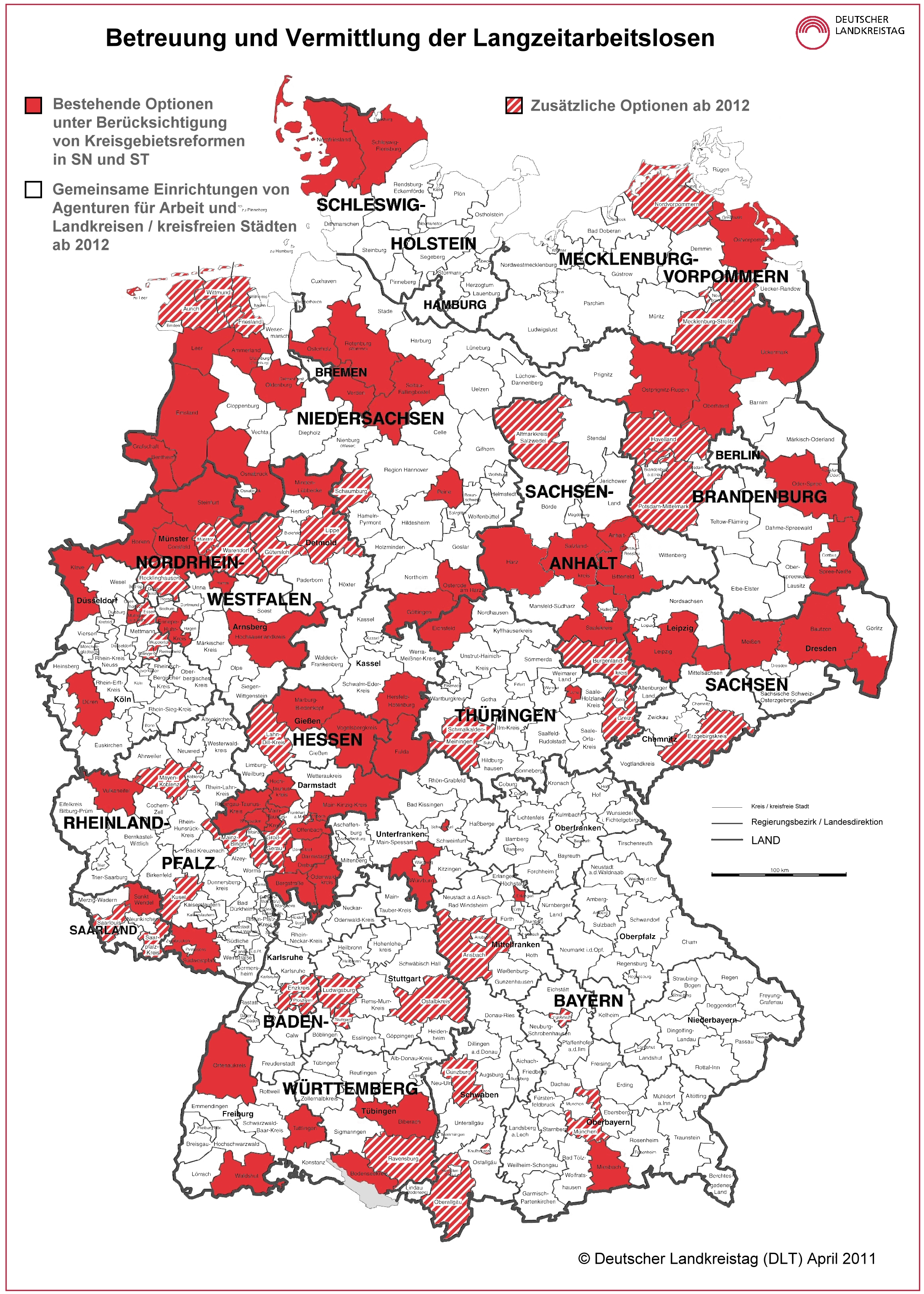 Überblick über die Optionskommunen in Deutschland.